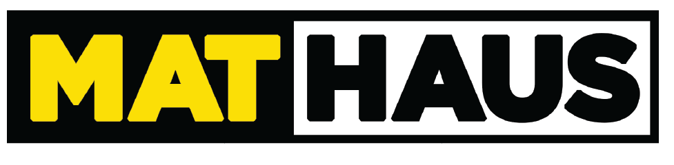 Logo MatHaus - retea de magazine de materiale de constructii si amenajari